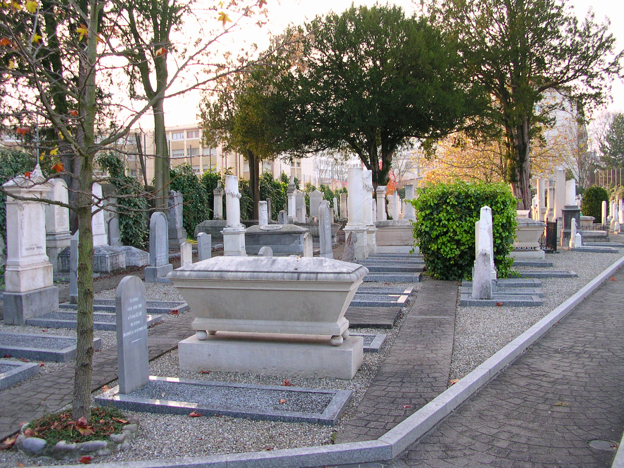 Parcelle de 1852 du cimetière juif de Carouge. Présence de nombreux monuments à l'architecture typique du second empire français, avec quelques références à l'art égyptien.